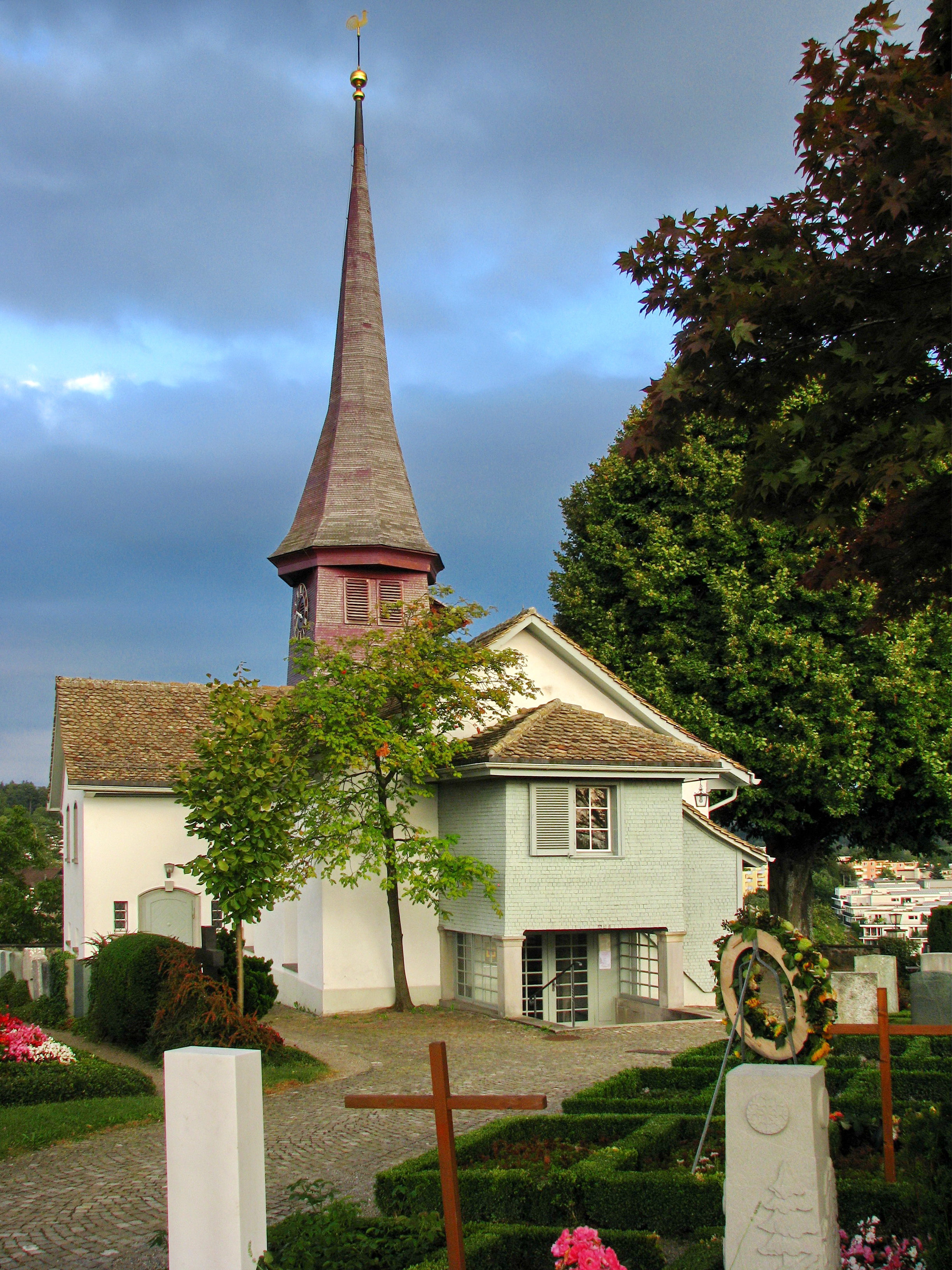 Alte Kirche (Old church) in Zürich-Witikon (Switzerland)